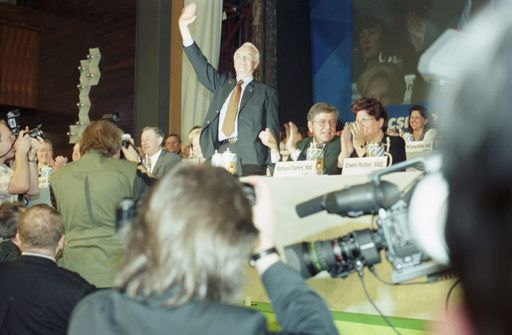 Politischer Aschermittwoch